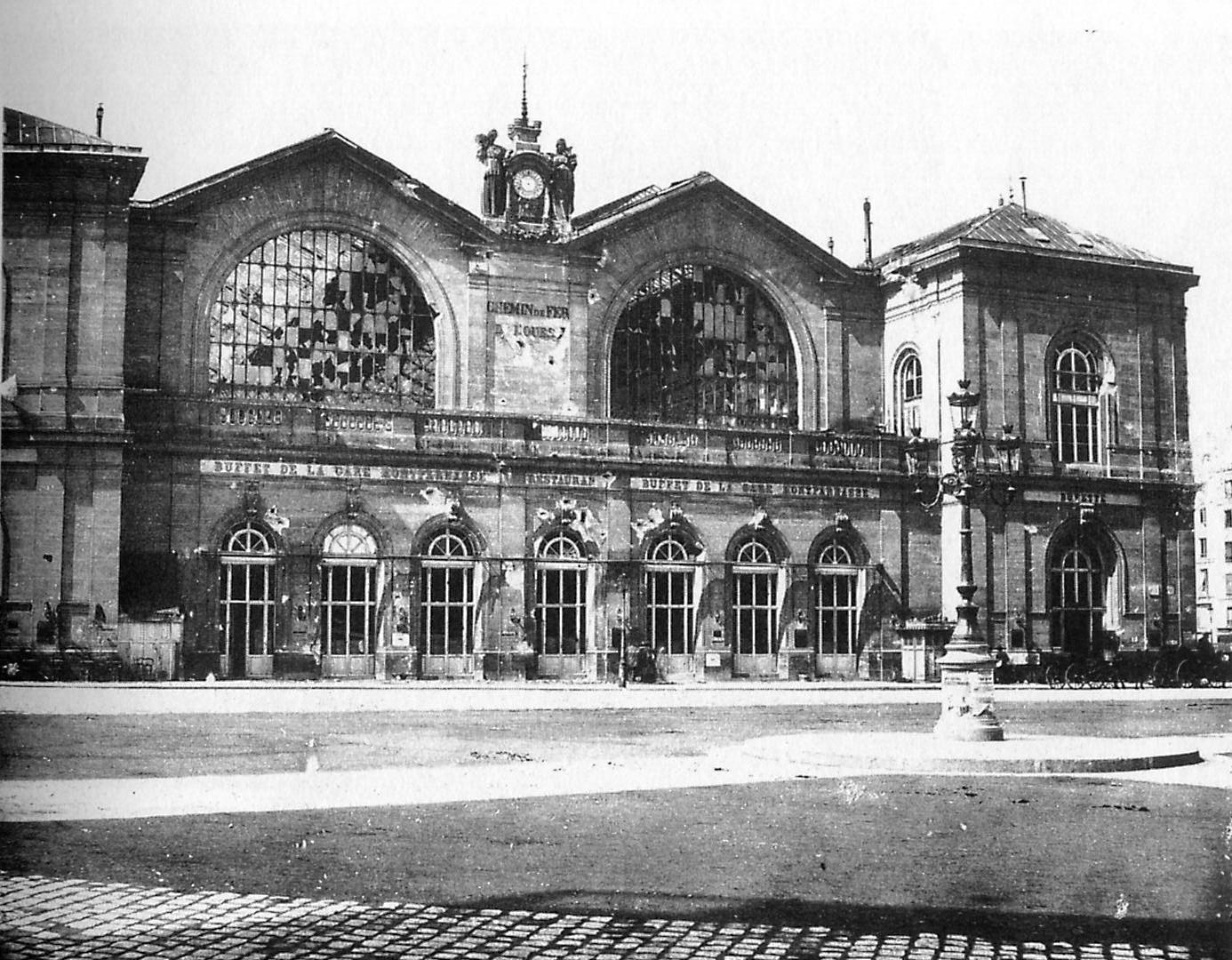 La gare Montparnasse après la Commune de Paris